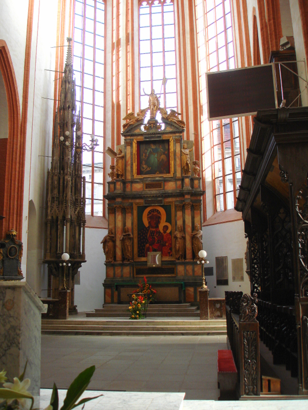 Wrocław, kościół par., ob. garnizonowy p.w. św. Elżbiety, 1 ćw. XIV, 1486